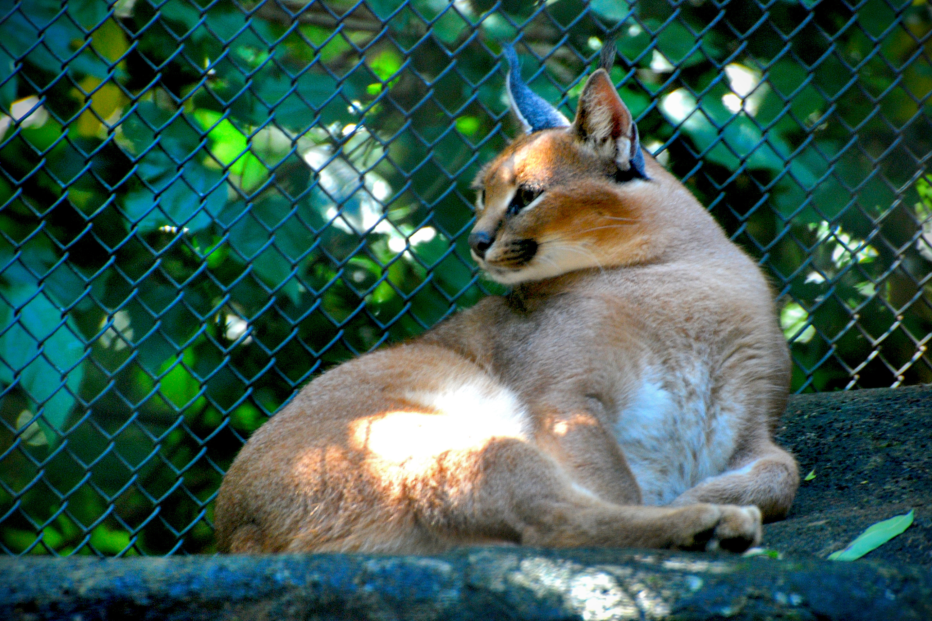 Caracal caracal